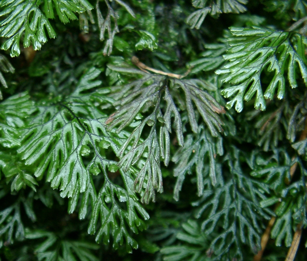 Hymenophyllum mit Sporangien